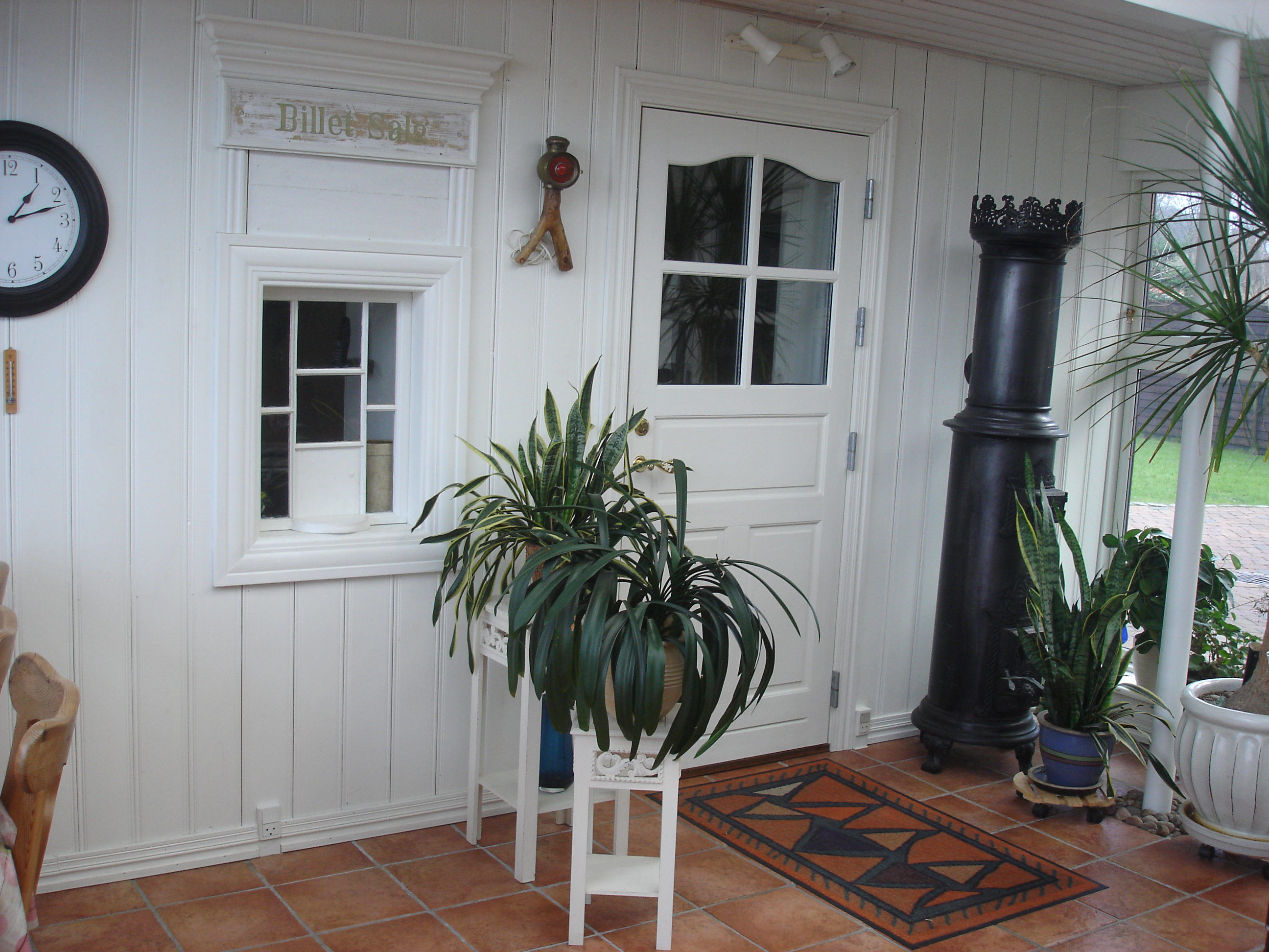 I udestuen mellem baneformandsboligen og retiraden på Lundbæk billetsalgssted er billetlugen bevaret, og kakkelovnen fra ventesalen er flyttet herud